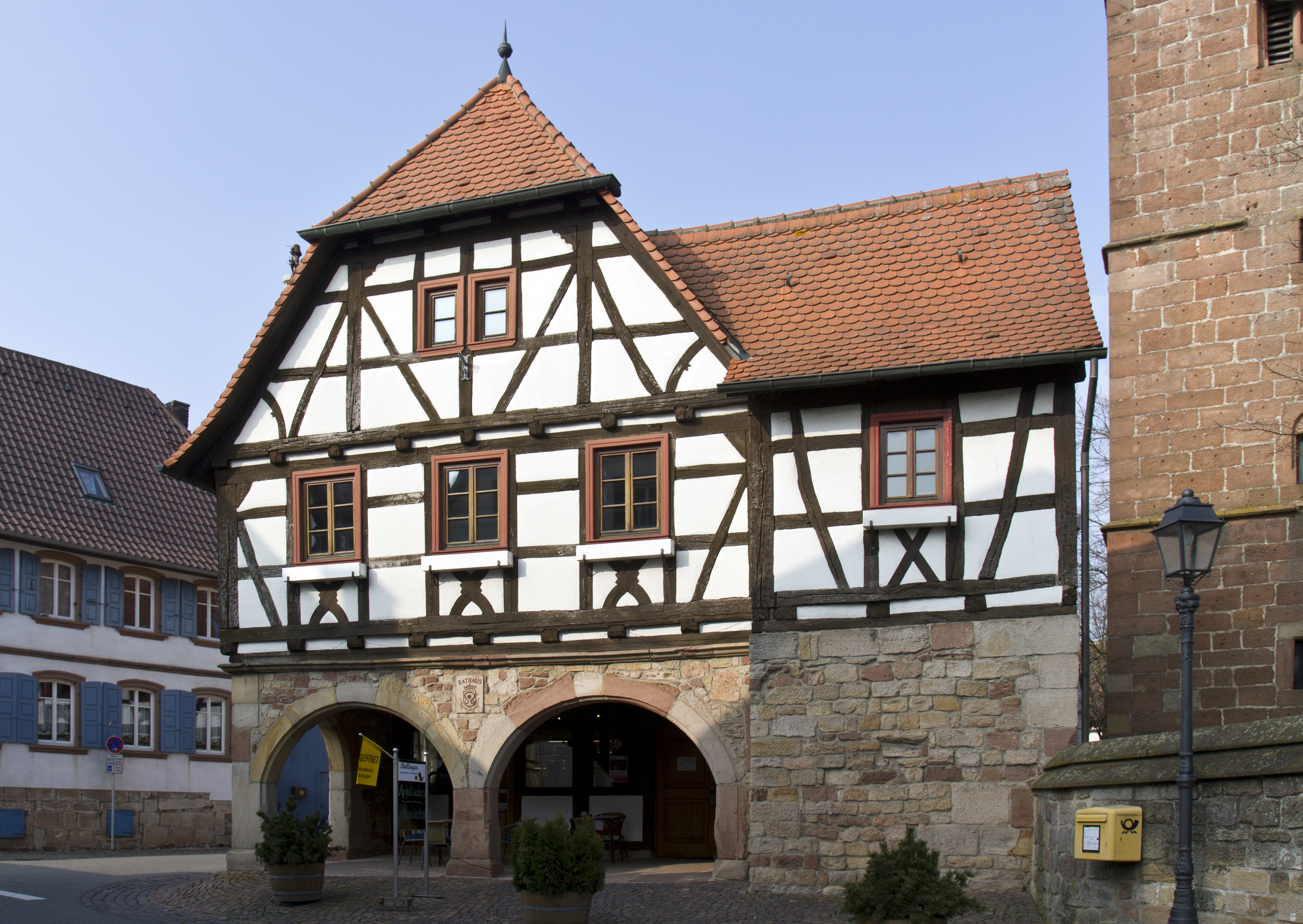 Heuchelheim-Klingen, Ortsteil Heuchelheim, altes Rathaus